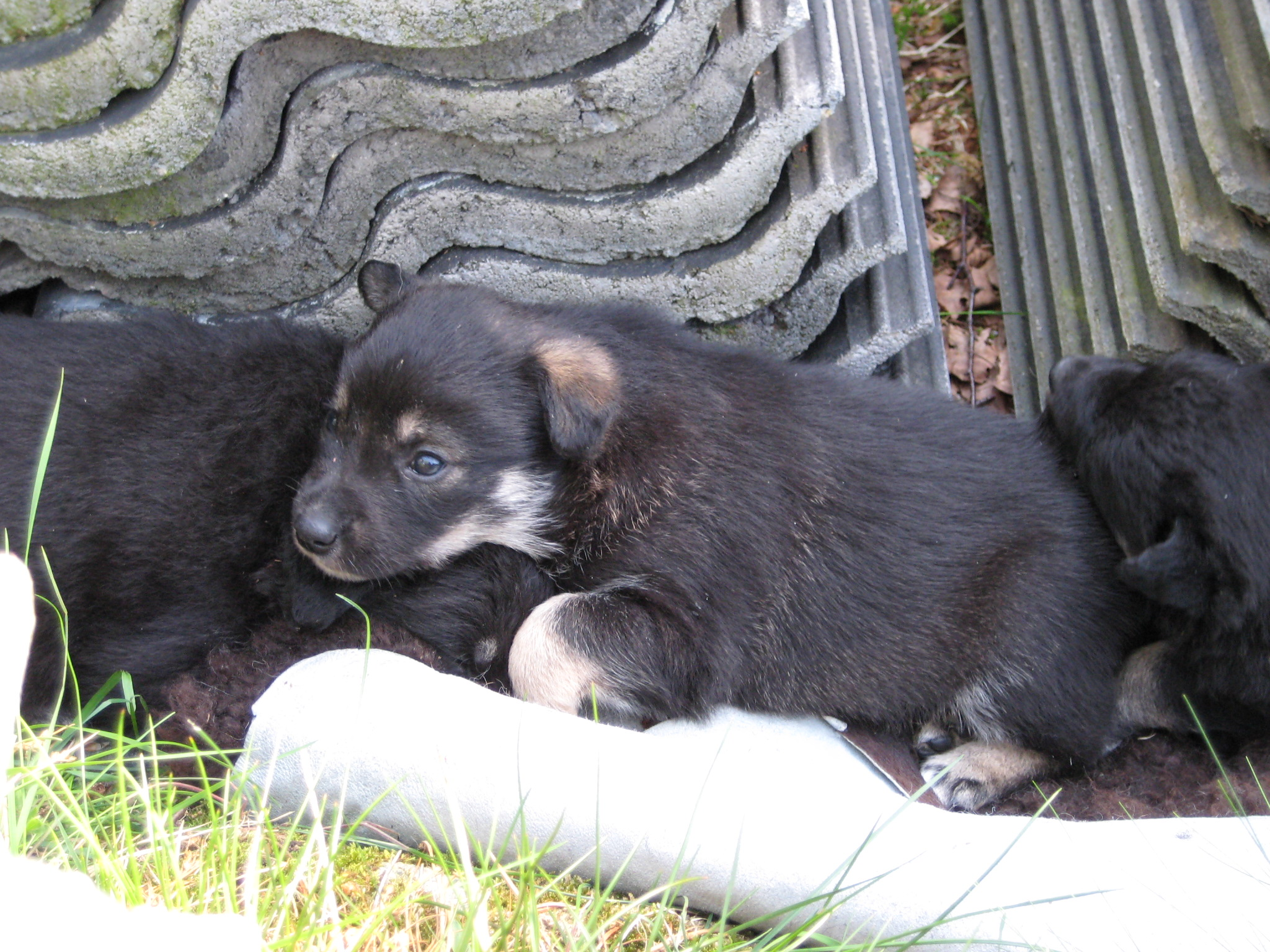 Lapsk Vallhund 6 veckor Kennel Raigaladei